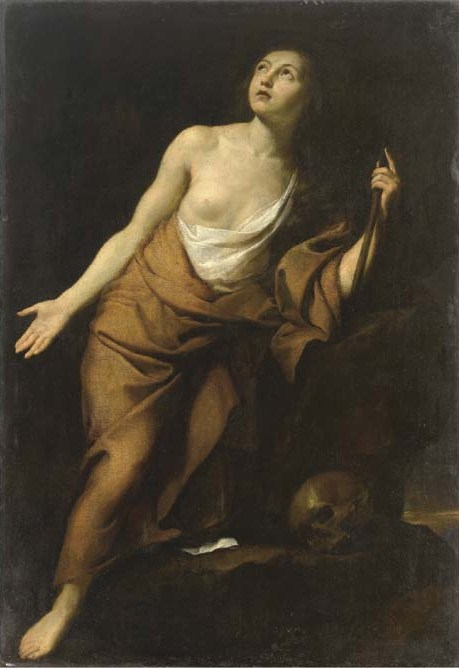 Penitent Magdalene